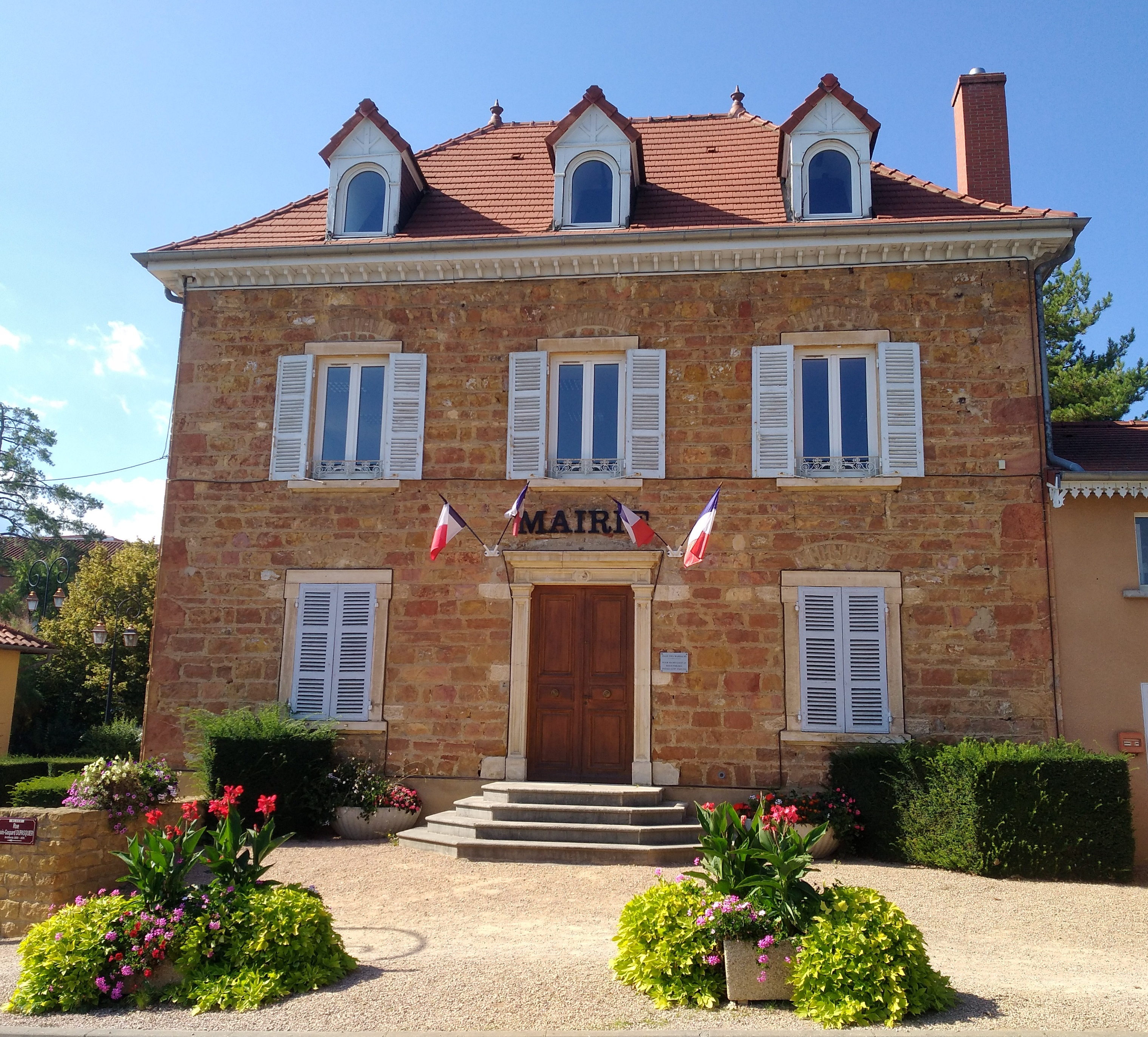 Mairie de Blacé, dans le département du Rhône.